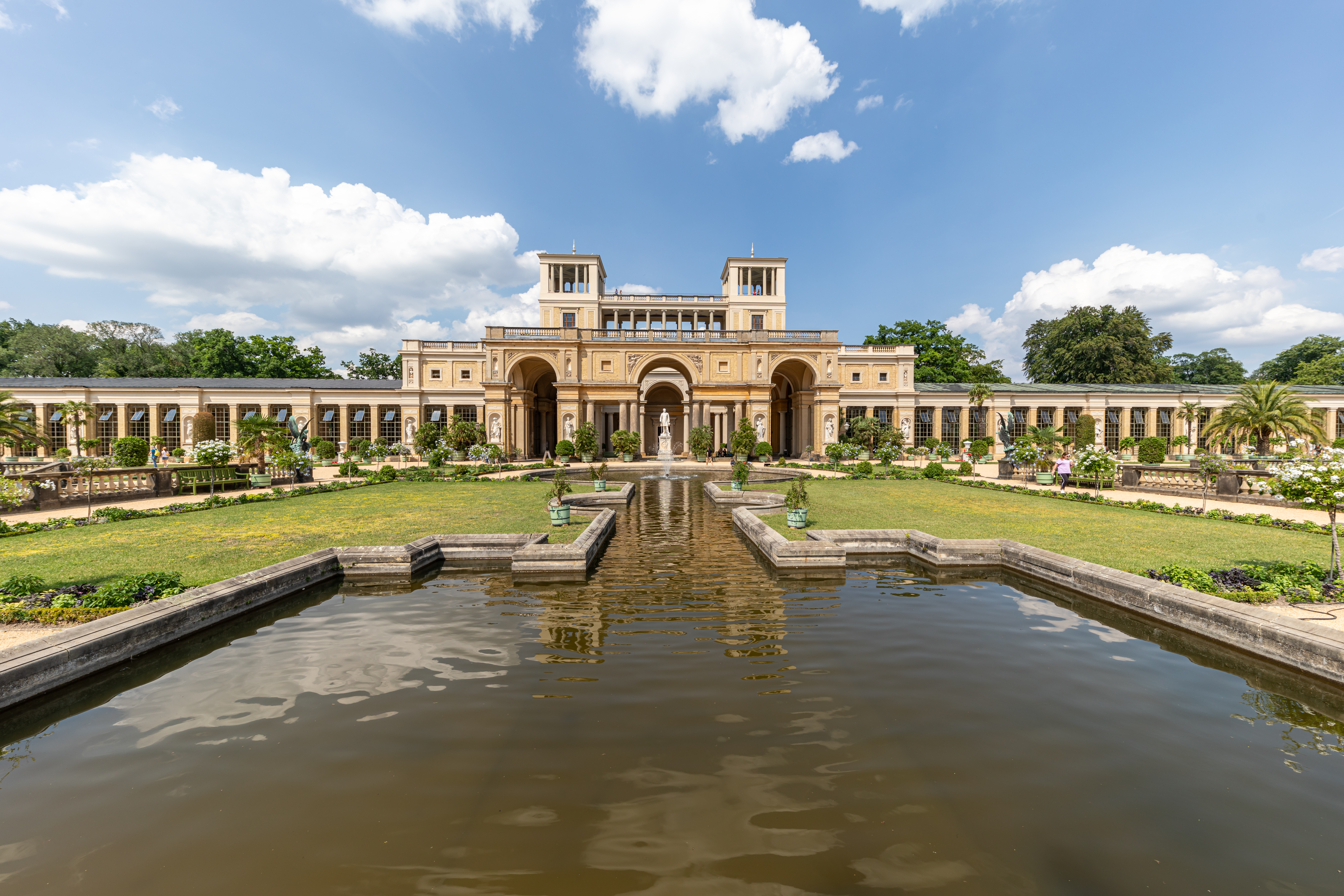 Orangerieschloss, Park Sanssouci, Potsdam 2019